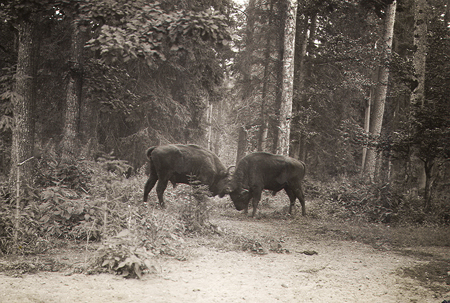 Żubry w Puszczy Białowieskiej, autor – prof. Jan Jerzy Karpiński.